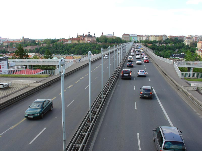 Nuselský most, pohled směrem do centra Prahy, příjezd z dálnice D1 od Brna Nuselský bridge, wiev to the centre of Prague photo autumn 2006